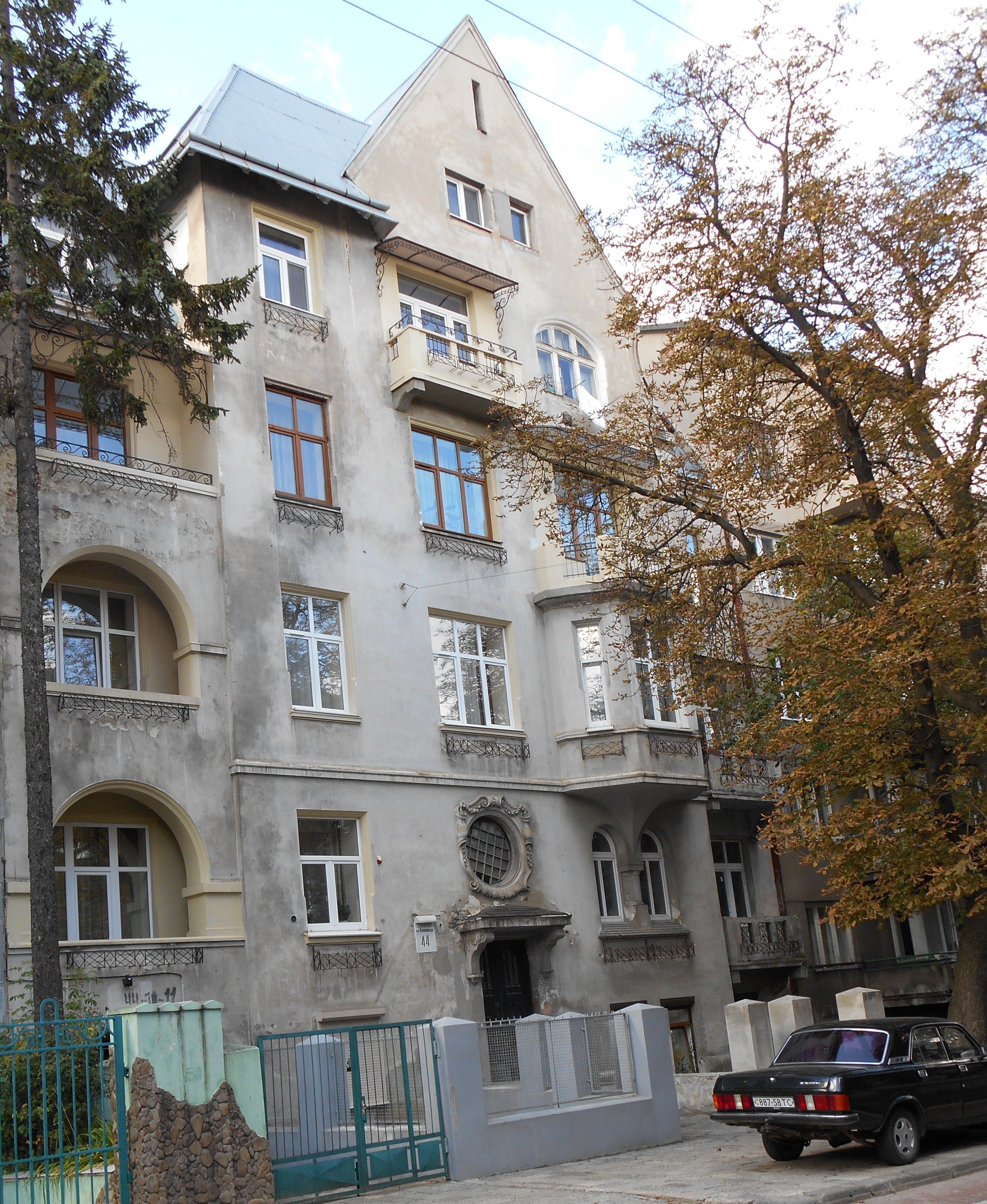 житловий будинок, Львів, Коновальця Є., 44